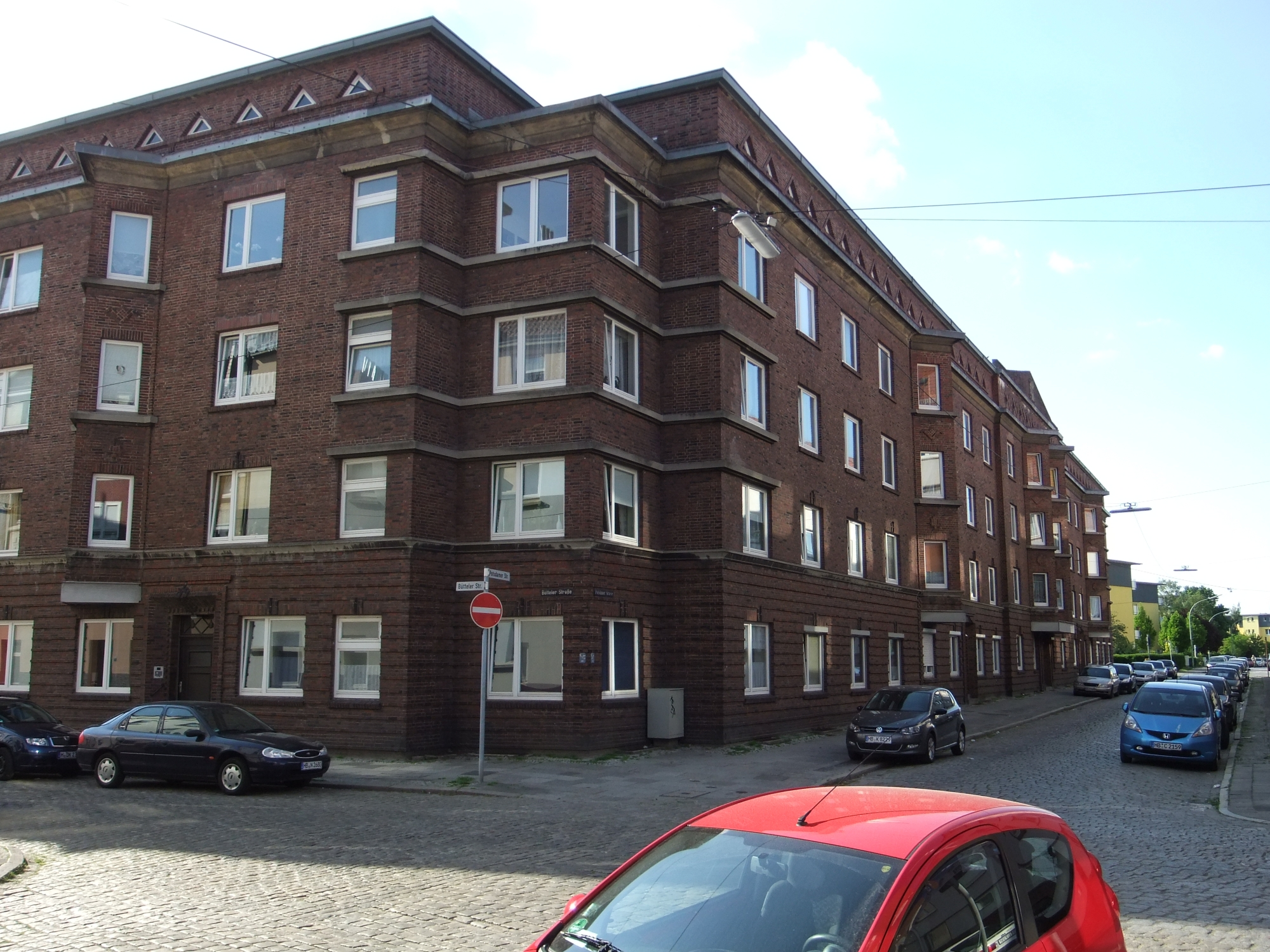 Spar- und Bauverein Lehe in Bremerhaven, Fritz-Reuter-Straße 42 . Die Gesamtanlage ist ein geschütztes Kulturdenkmal in der Freien Hansestadt Bremen, mit der Nr. 3069 beim Landesamt für Denkmalpflege registriert.